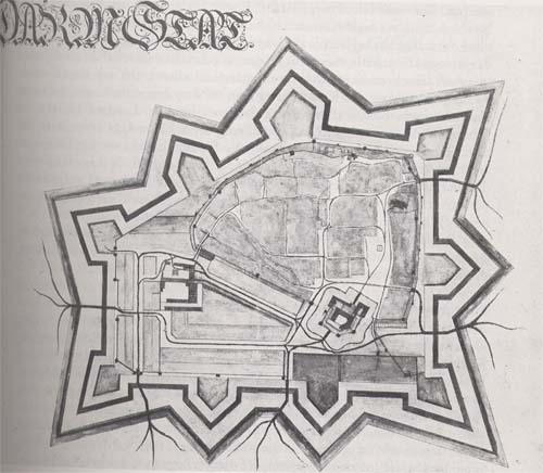 Im 17. Jahrhundert erstelltes Konzept zum Umbau der Stadt Darmstadt in eine Sternschanzenfestung